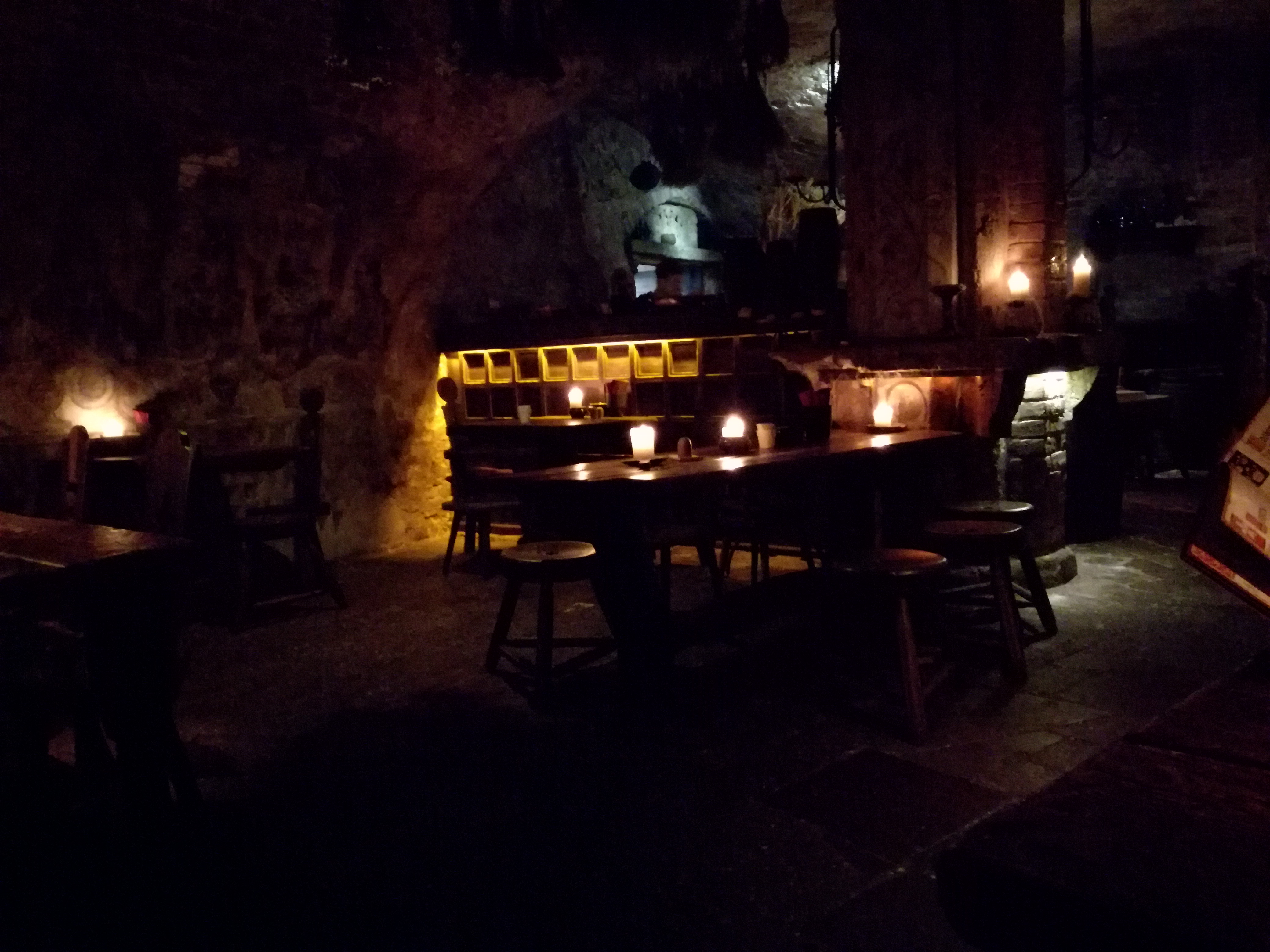 Винный погреб в Старой Риге